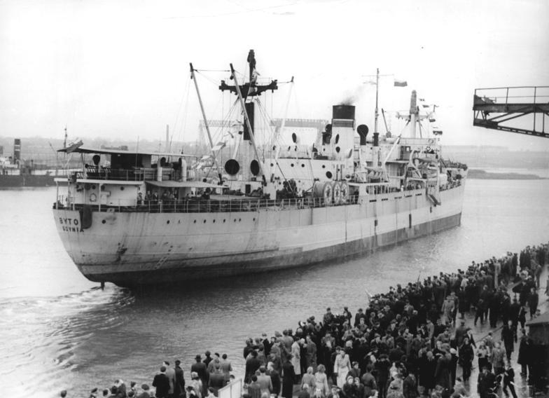 Wismar, Hafen, Dampfer Zentralbild Bez. Red. Rostock 16.1.1956 Polnischer Dampfer mit deutschem Krankenhaus feierlich nach Vietnam verabschiedet Am Sonntag, dem 15.1.1956, wurde in Wismar der polnische Dampfer "Bytom" feierlich verabschiedet. Er bringe eine vollständige Krankenhauseinrichtung, die die Bevölkerung der Deutschen Demokratischen Republik gespendet hat, nach der vietnamesischen Volksrepublik. UBz: Viele Werktätige, vor allem Werftarbeiter, sind zur Verabschiedung des polnischen Dampfers am Kai des Wismarer Hafens erschienen. Information added by Wikimedia users.